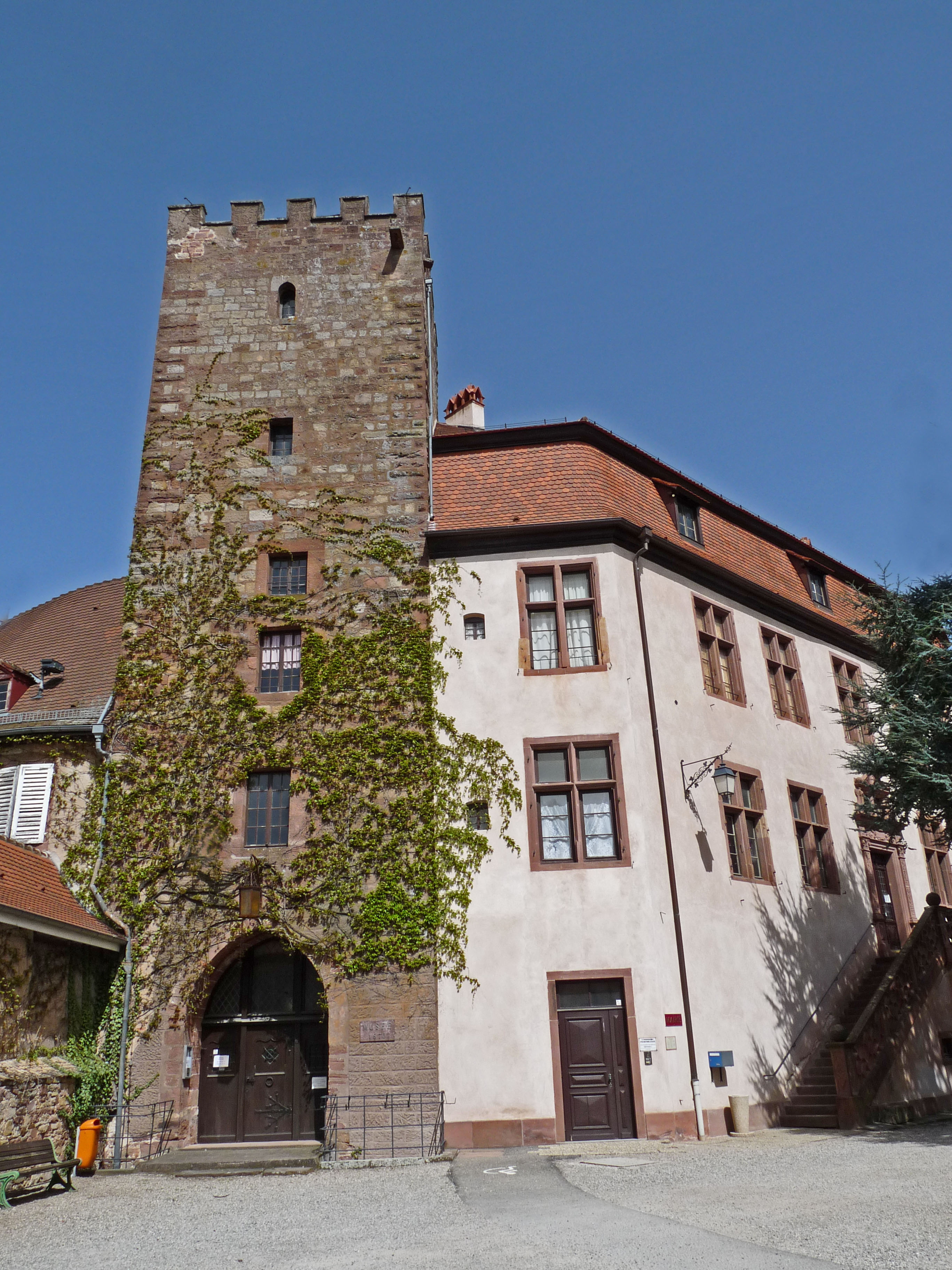 Entrée du musée au château de Woerth (Bas-Rhin). L'ensemble abrite aussi la mairie et le Musée de la bataille du 6 août 1870. Certains éléments sont inscrits aux Monuments historiques.